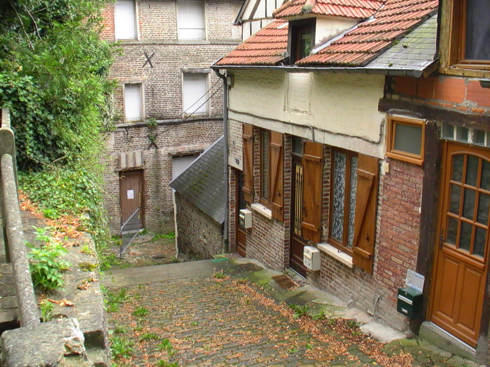 Ruelle de Gaillon : sente de la reine Margot.